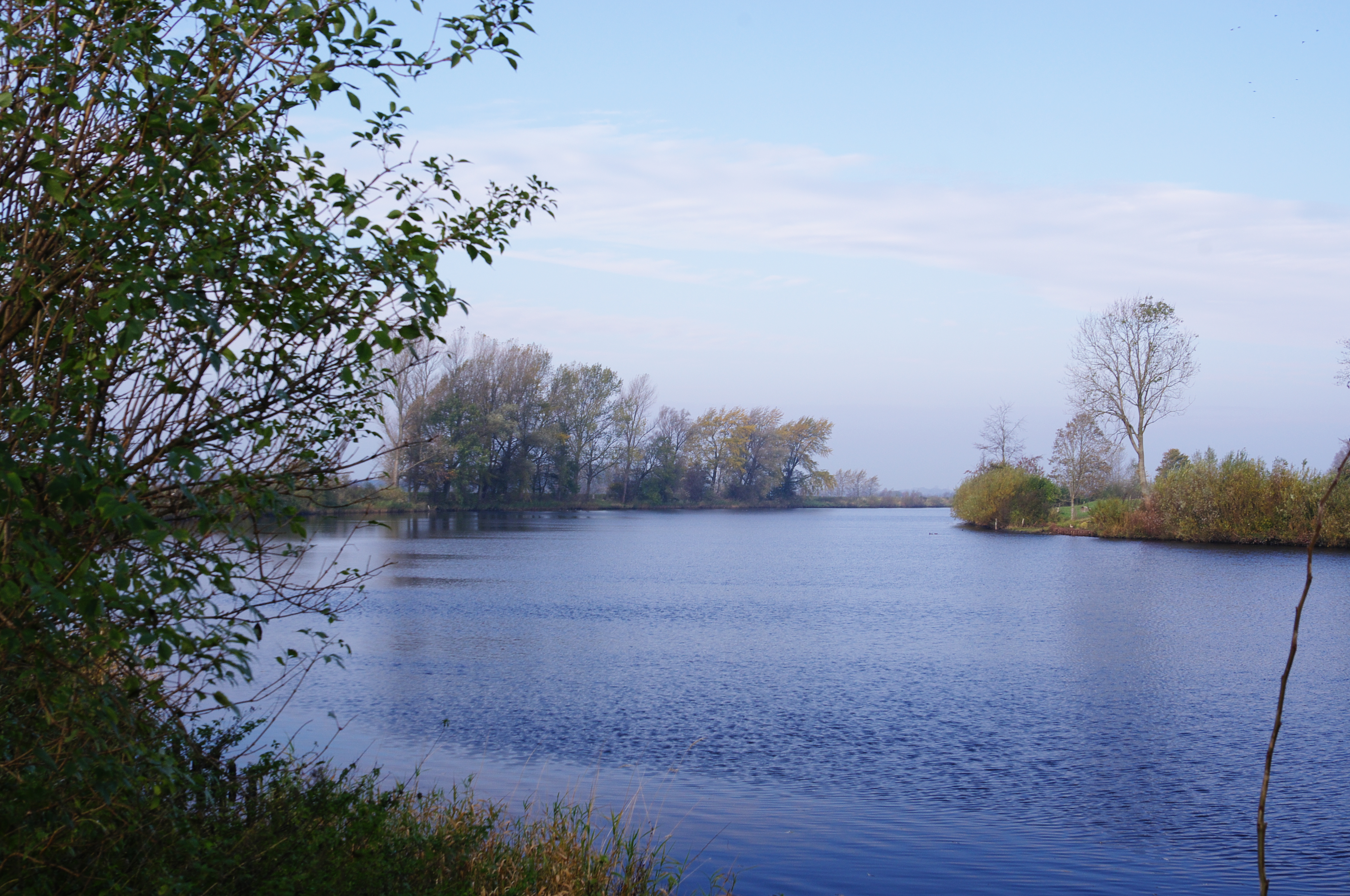 Landschaft in Schleswig-Holstein, Eider bei Pahlen, Dithmarschen